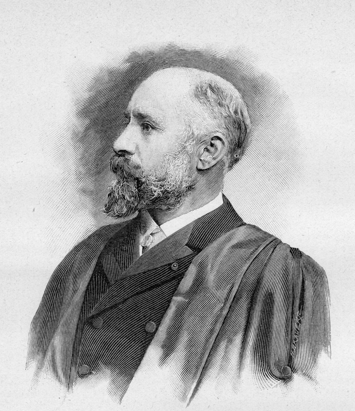 Portrait (gravure) de Théophile Homolle (1848-1925), archéologue français